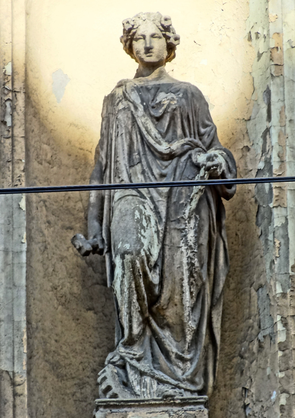 Kamienica przy ul. Gdańskiej 9 w Bydgoszczy. Rzeźba - alegoria przemysłu